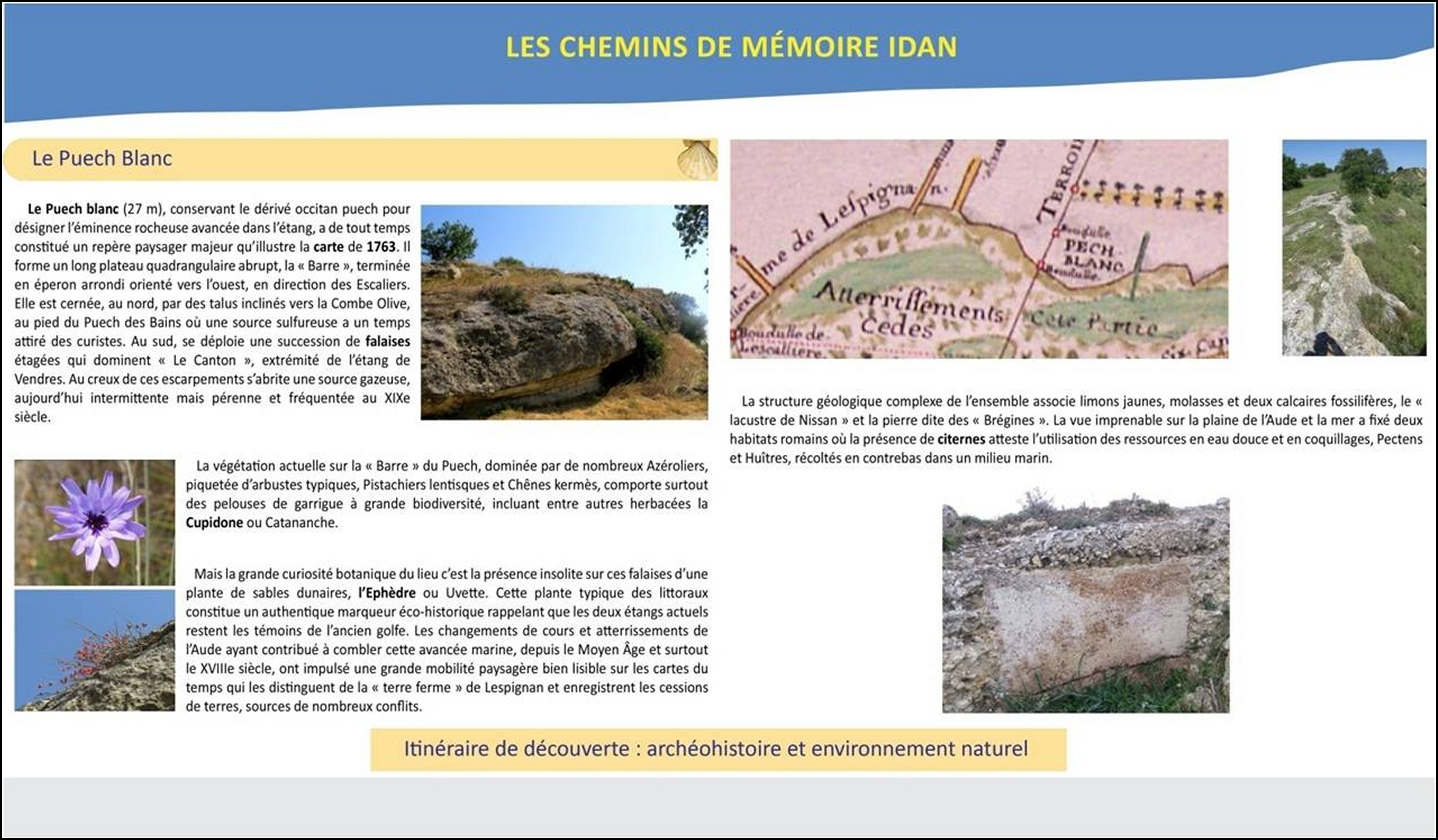 Environnement naturel de Lespignan (Hérault, Occitanie) : le Puech blanc et sa barre.